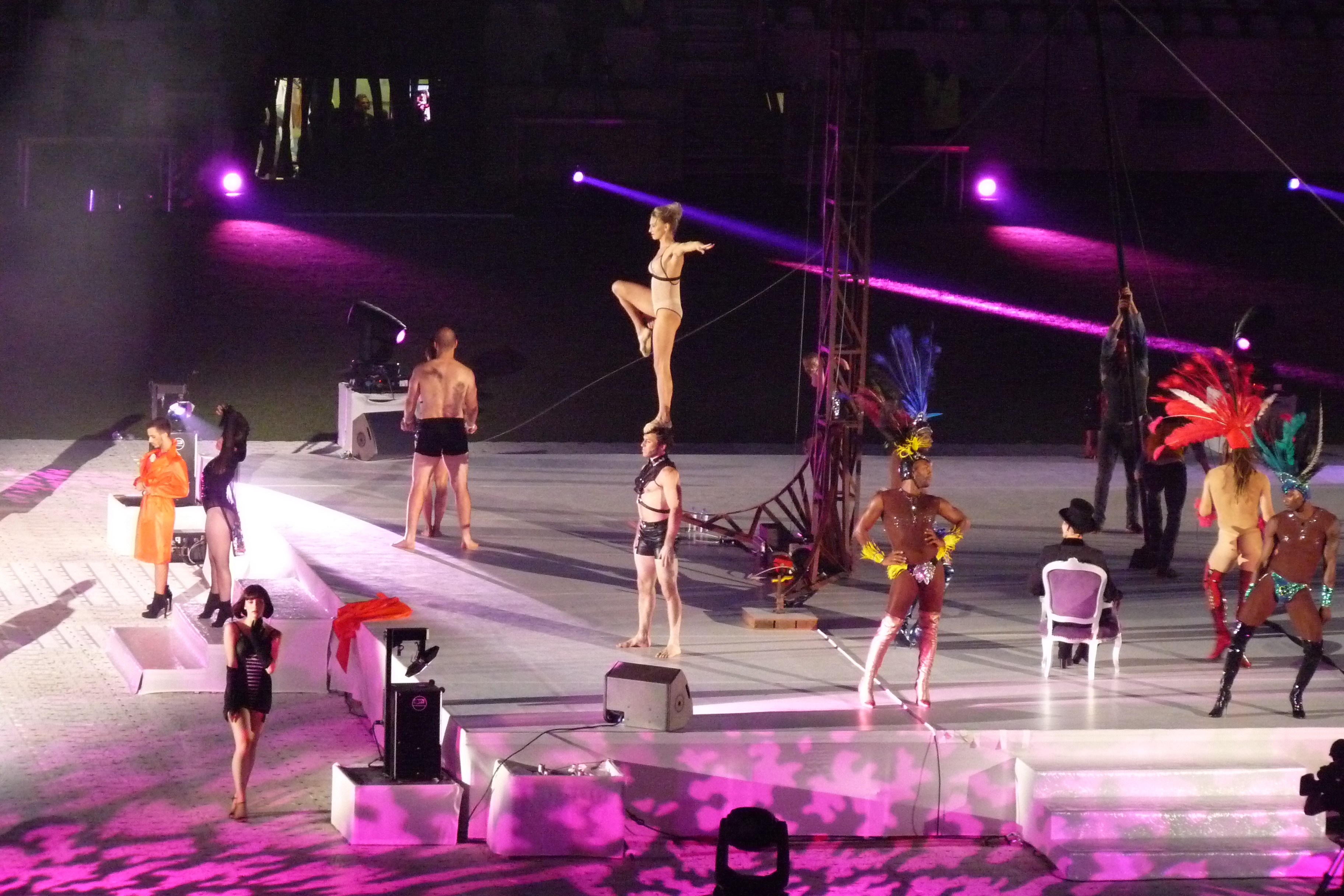 Cérémonie d'ouverture des 10ème Gay Games à Paris, stade Jean-Bouin.